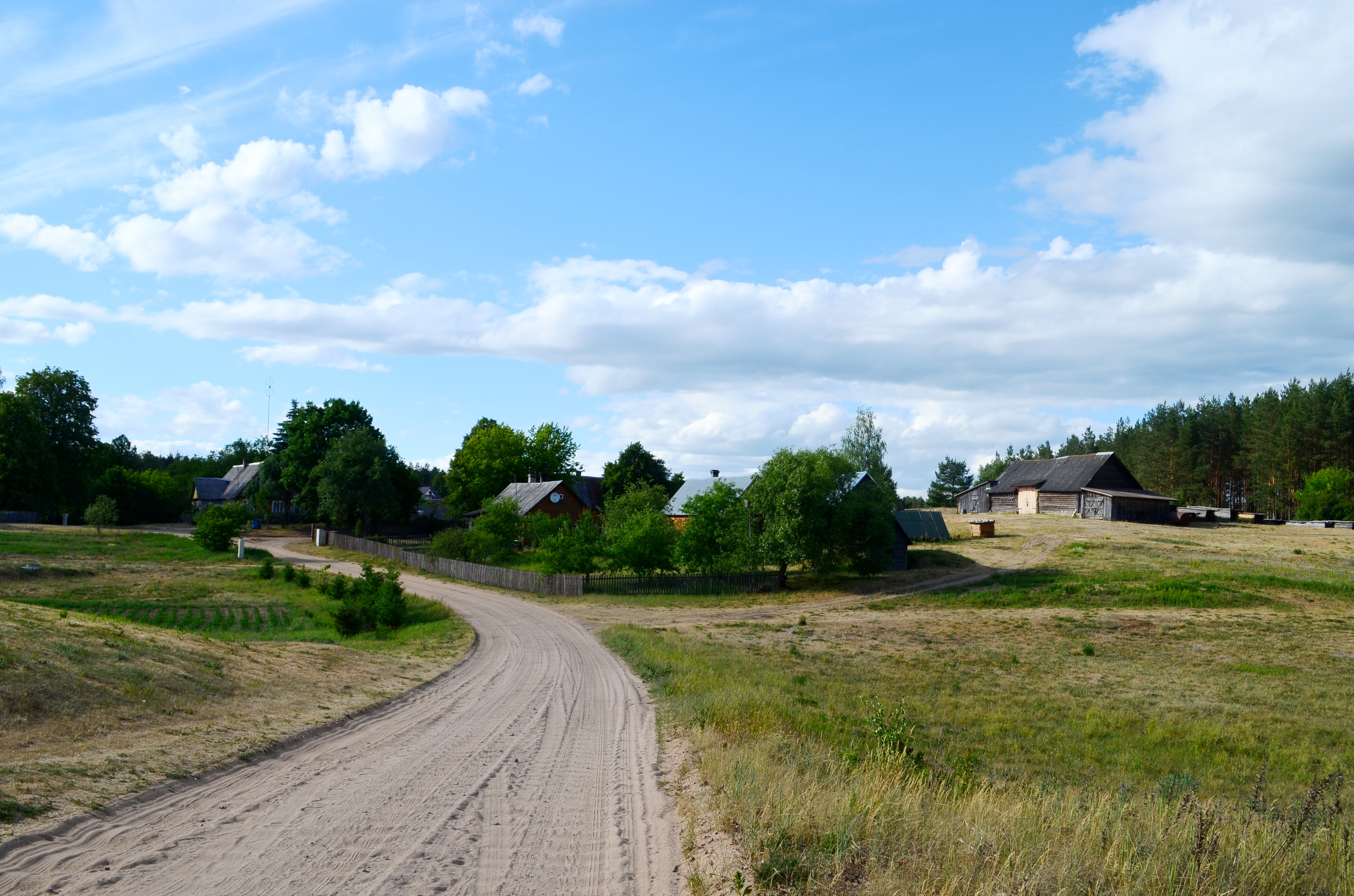 Mergežeris, Varėnos raj.